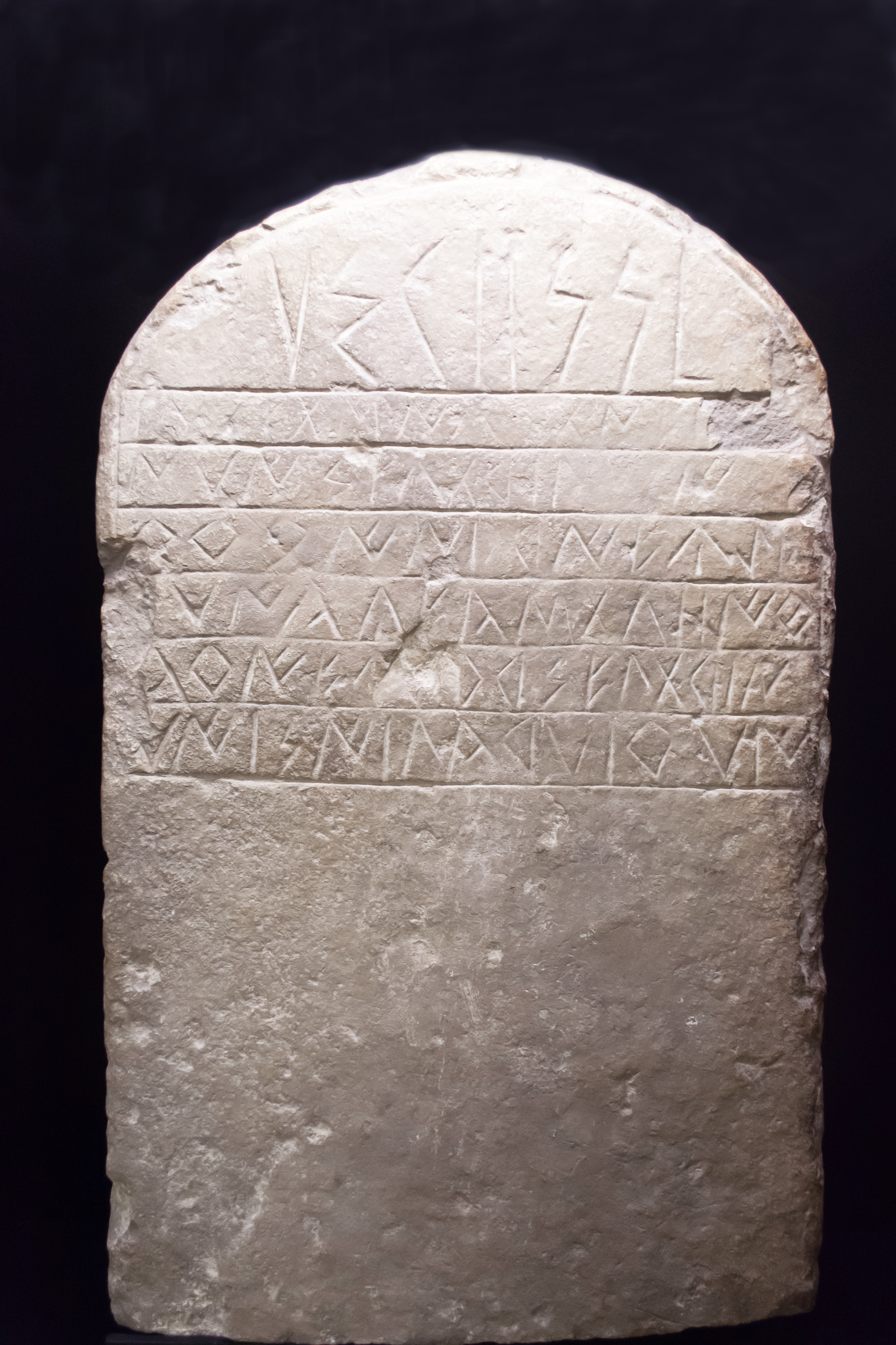 Part superior d'una estela funerària ibèrica, amb inscripcions. siglo I aC. Procedeix de Sinarques. Museu de Prehistòria de València.